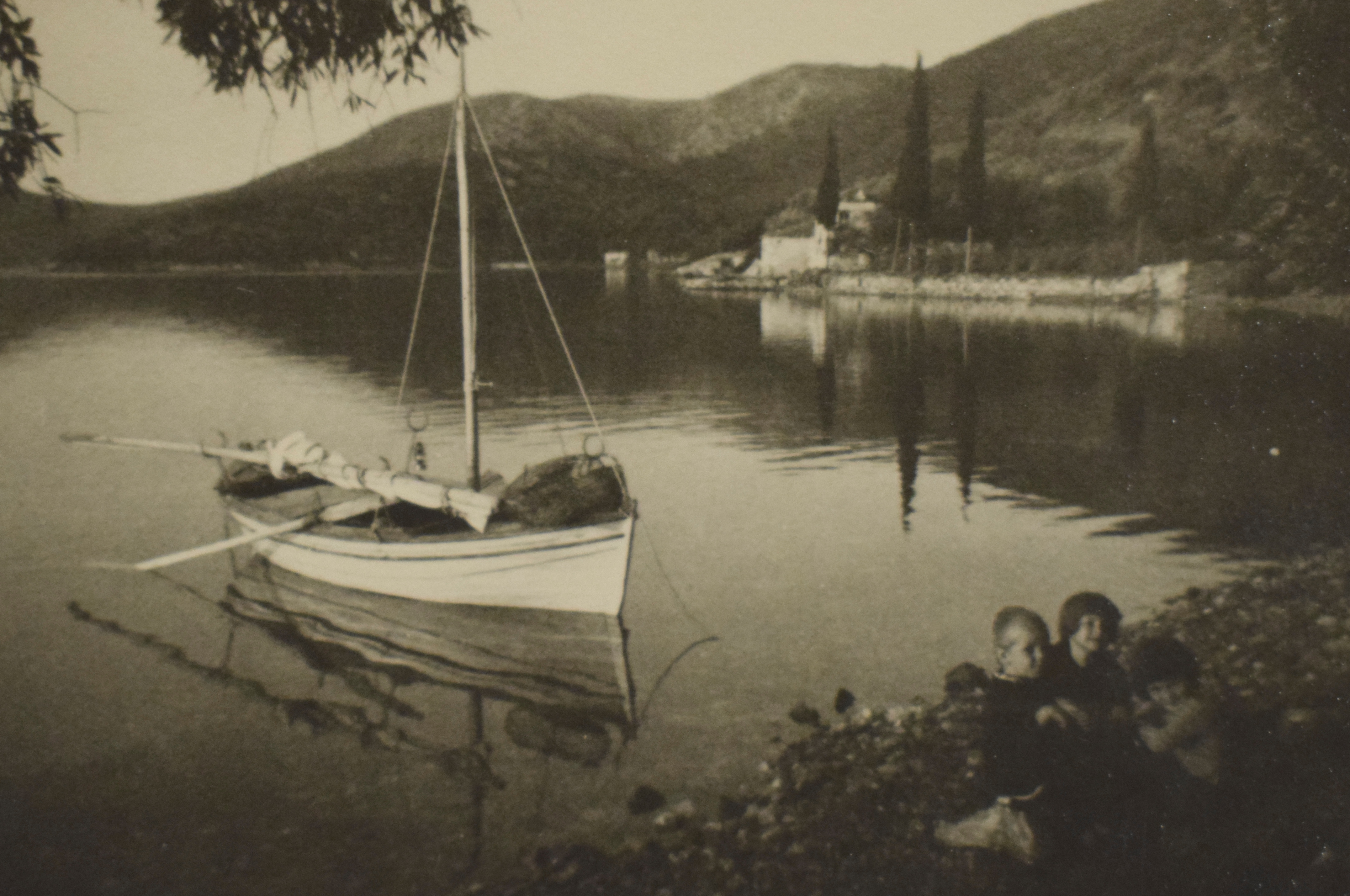 Milina